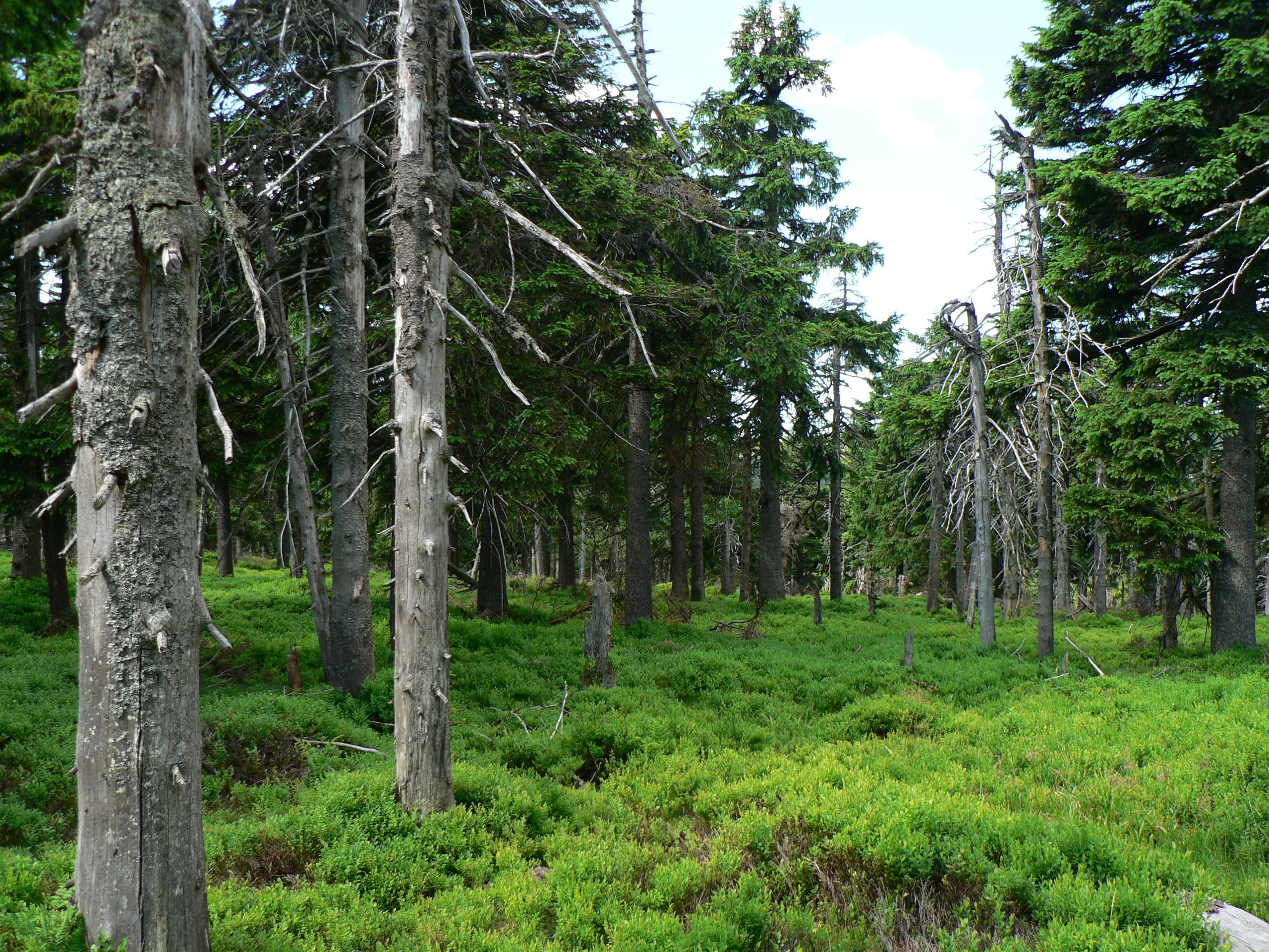 Pralesovitá amrčina v oblasti Trojmezí, Hrubý Jeseník